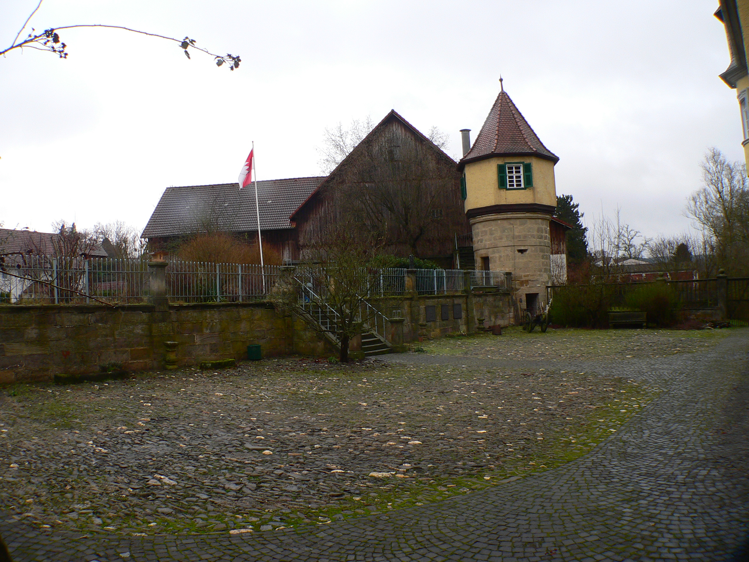 Hinteres (Neues) Schloss in Küps, Bayern, Regierungsbezirk Oberfranken, Landkreis Kronach – „Eisturm“